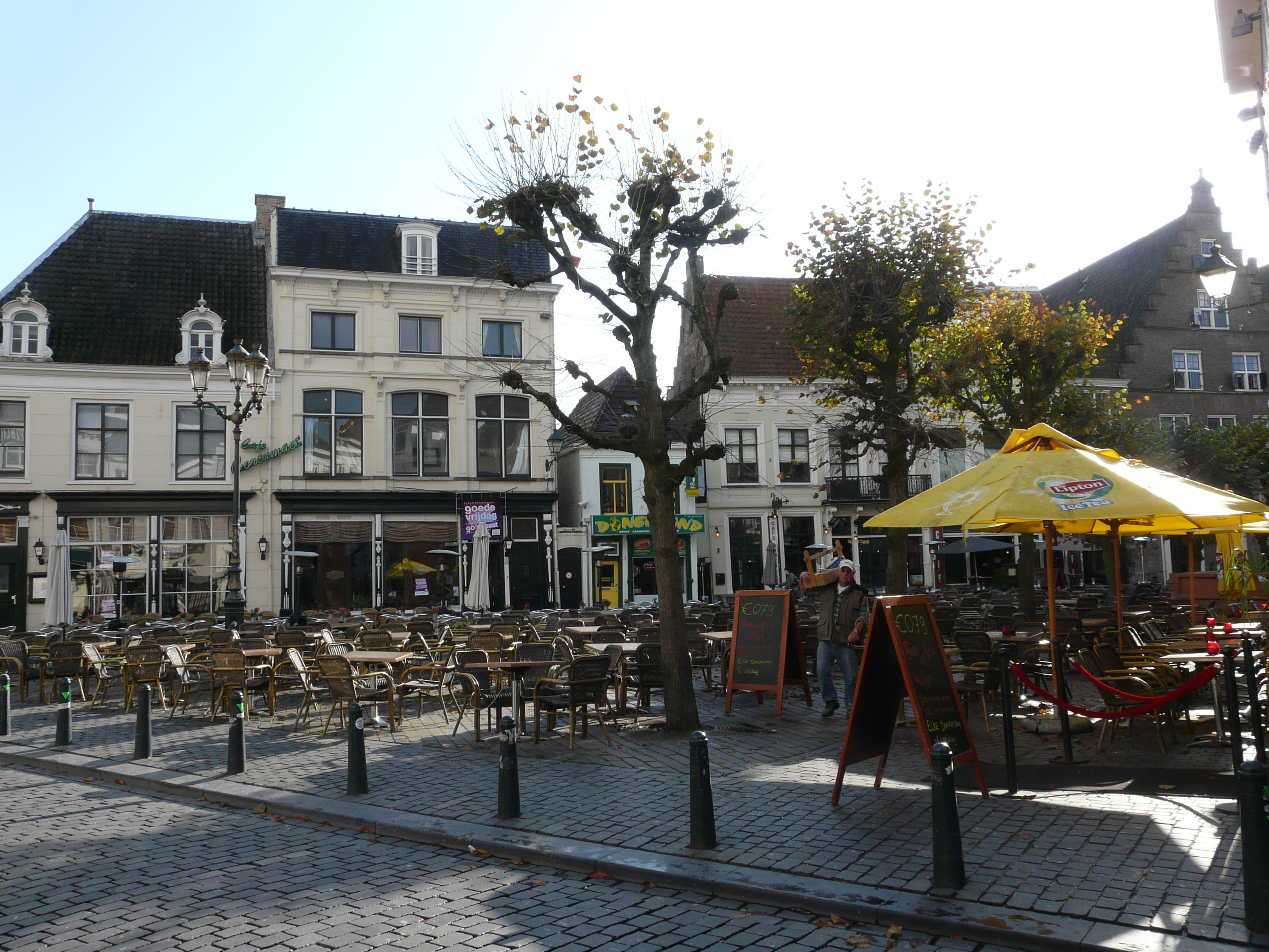 Zicht op een deel van de Havermarkt in Breda